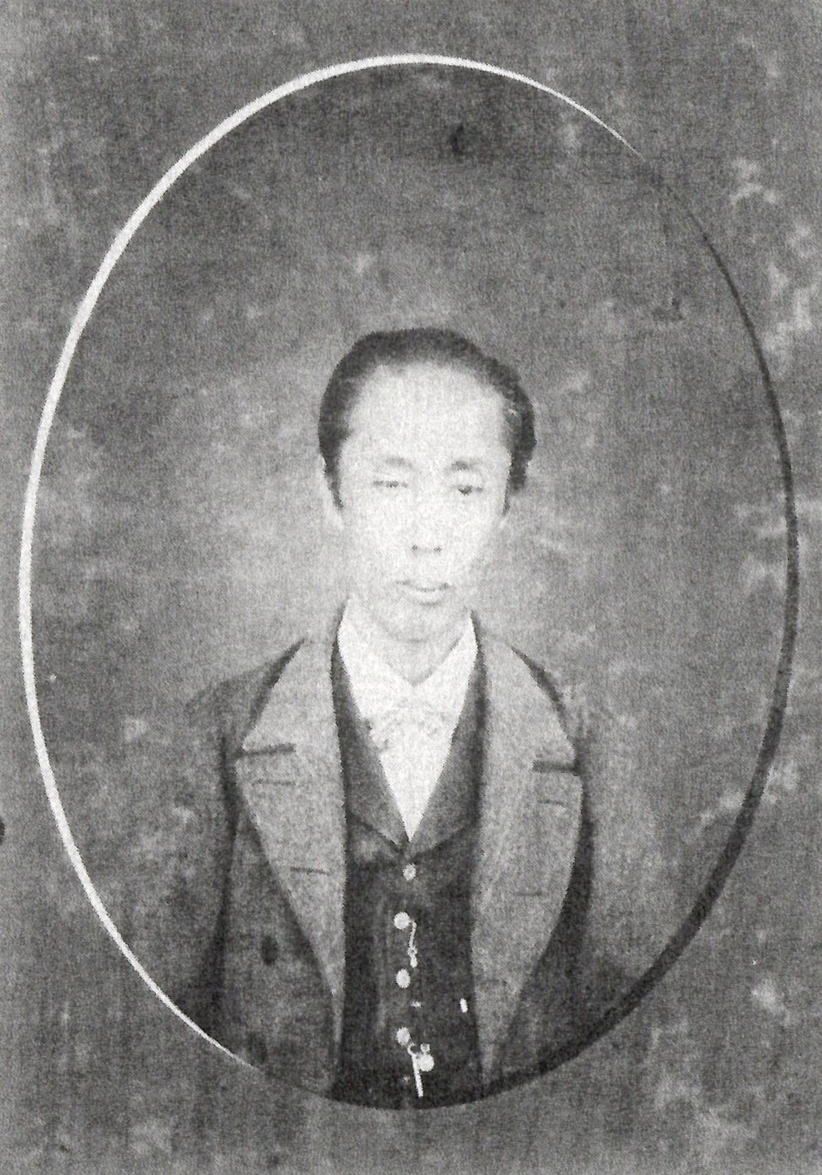 九鬼隆備の肖像写真。